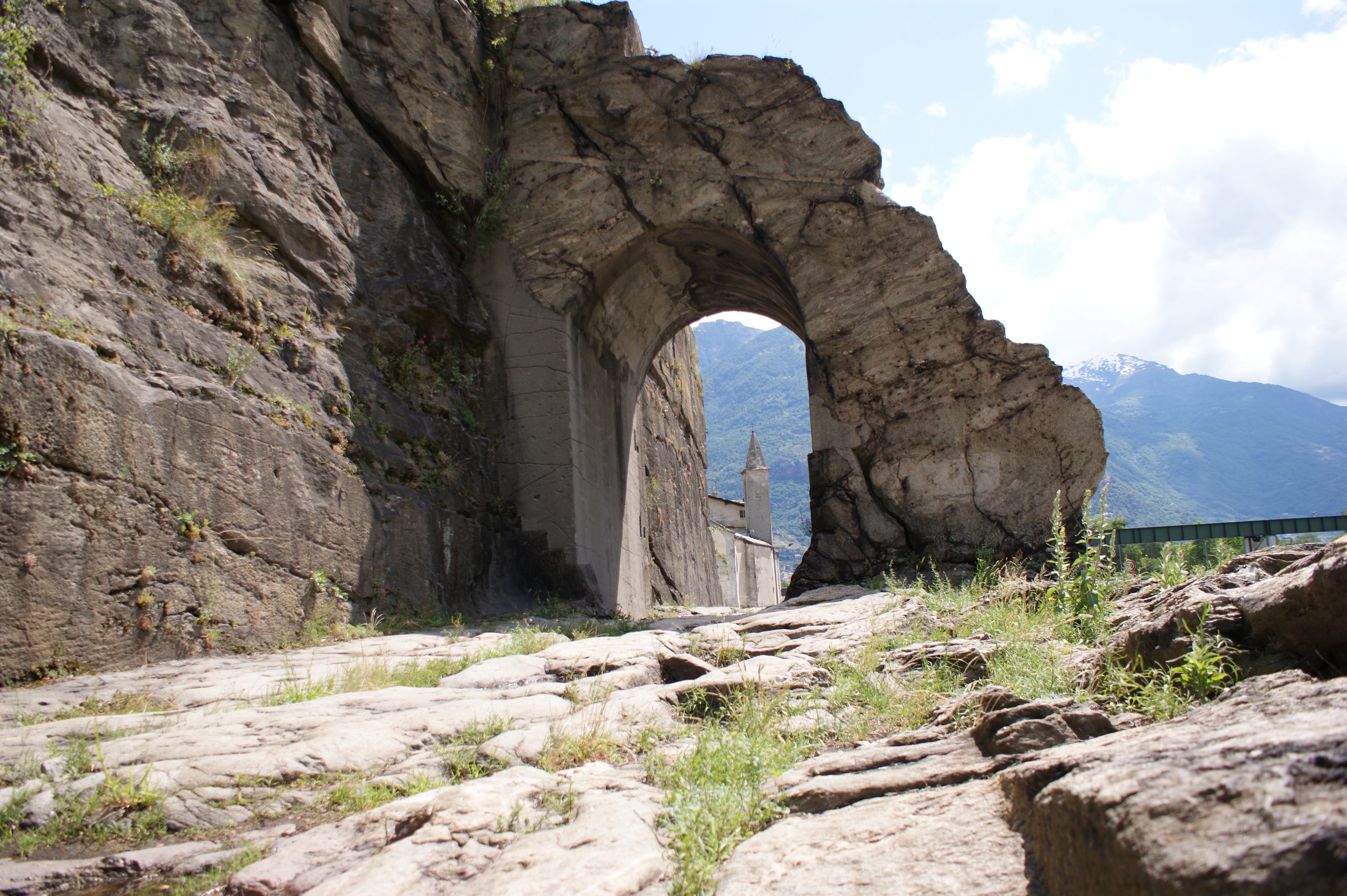 Tratto della via consolare delle Gallie This is a photo of a monument which is part of cultural heritage of Italy.